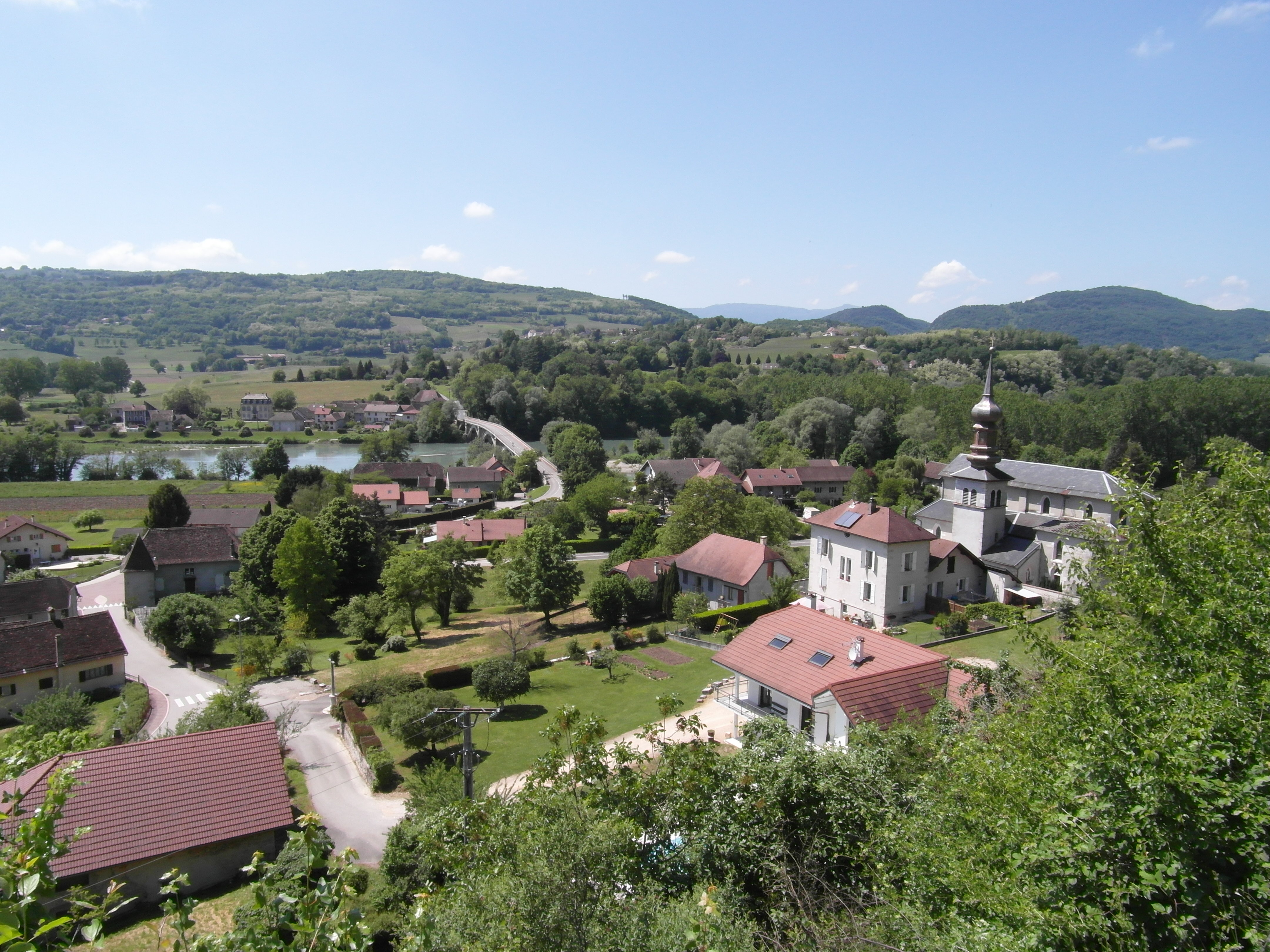 Bourg de Lucey (Savoie)